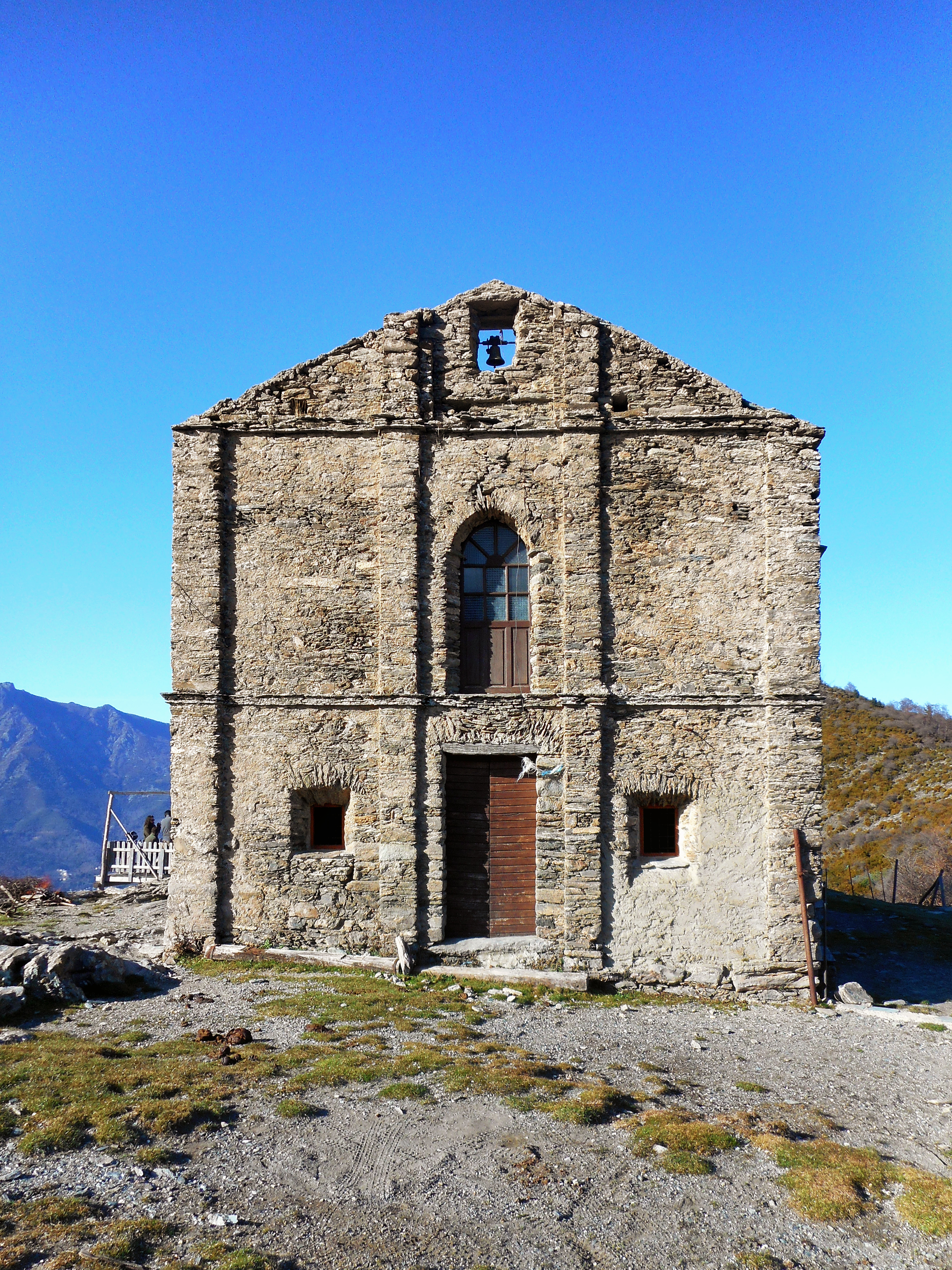 Monacia-d'Orezza, Castagniccia (Corse) - Église San Bertolomeo, située à 1074 m d'altitude